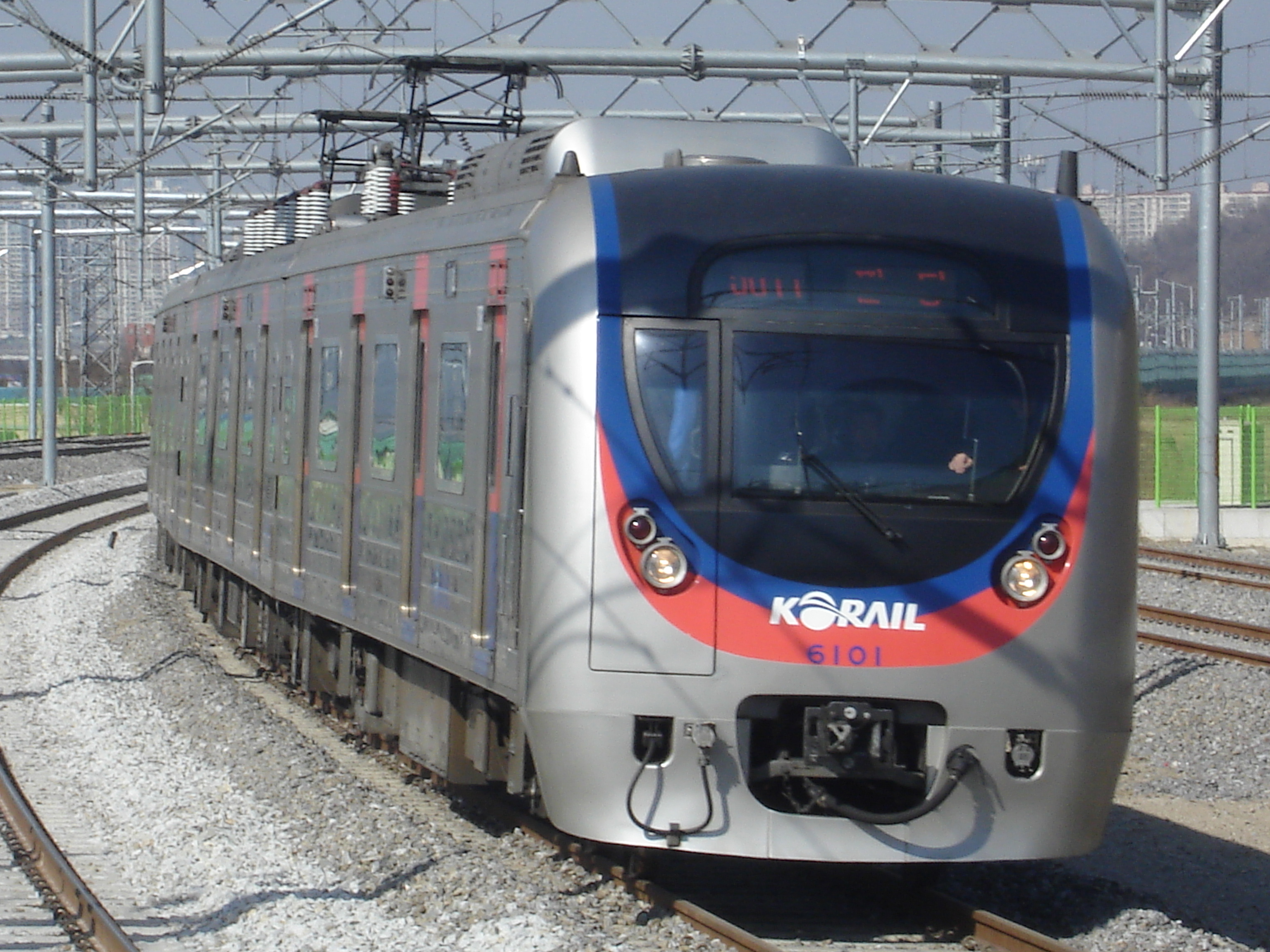 팔당역에 진입중인 32108편성